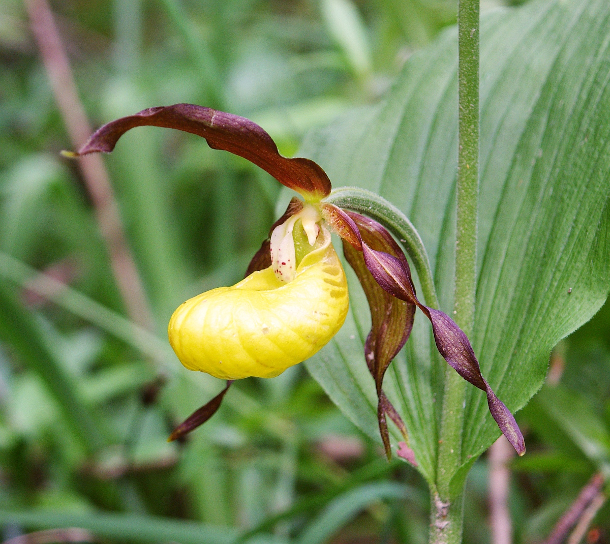 Cypripedium calceolus, Tauberland, Germany